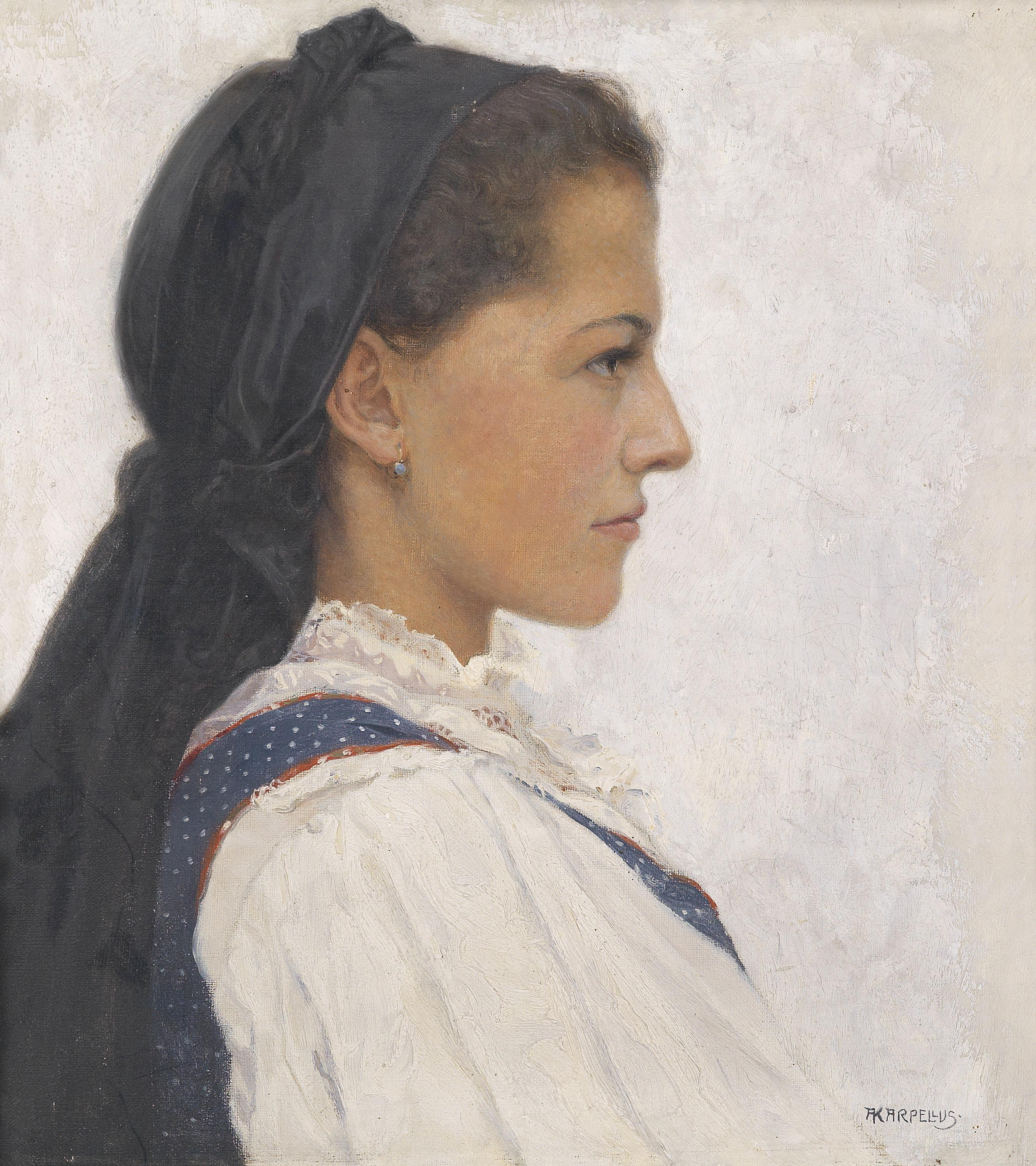 Die Mali